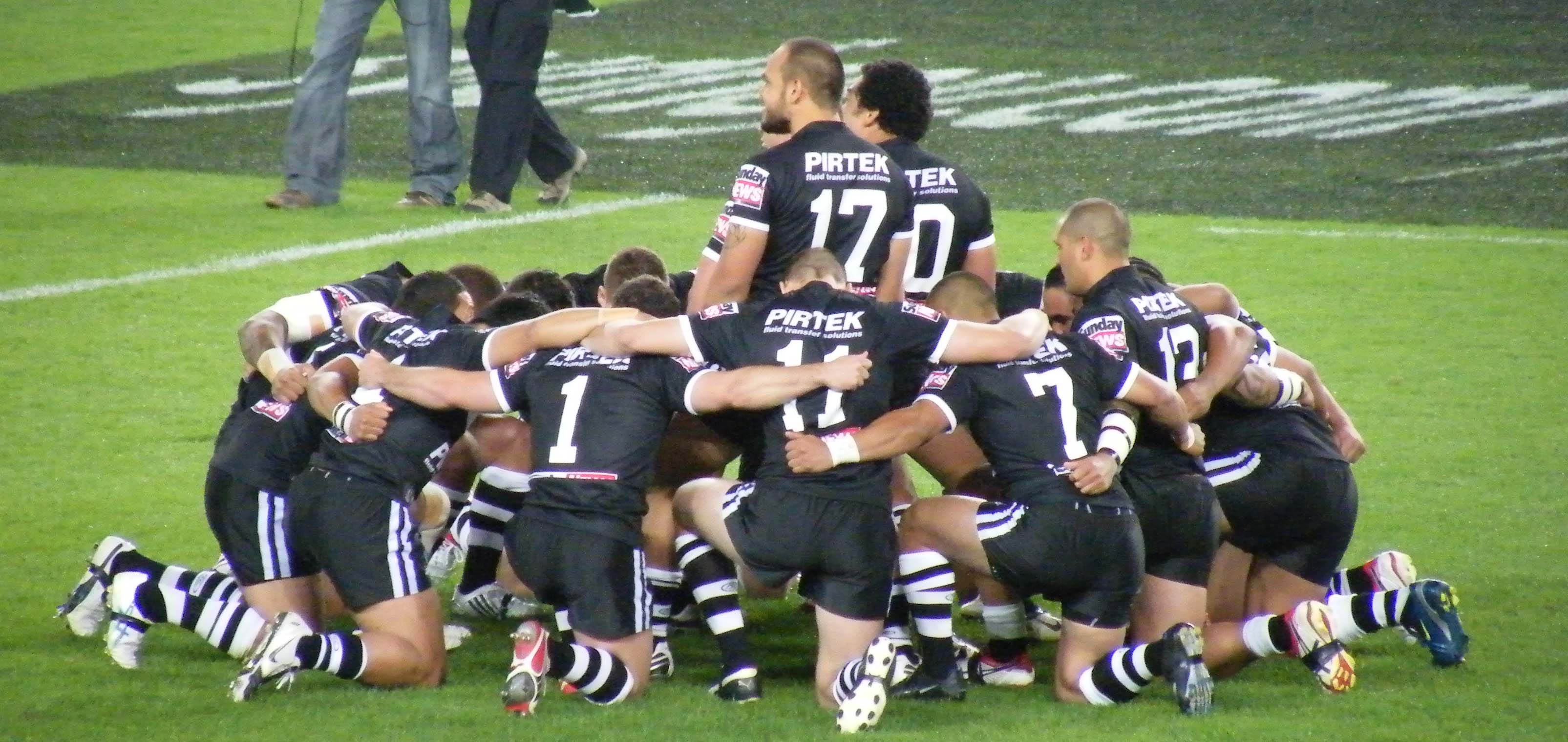 Aussie Stadium, Sydney.